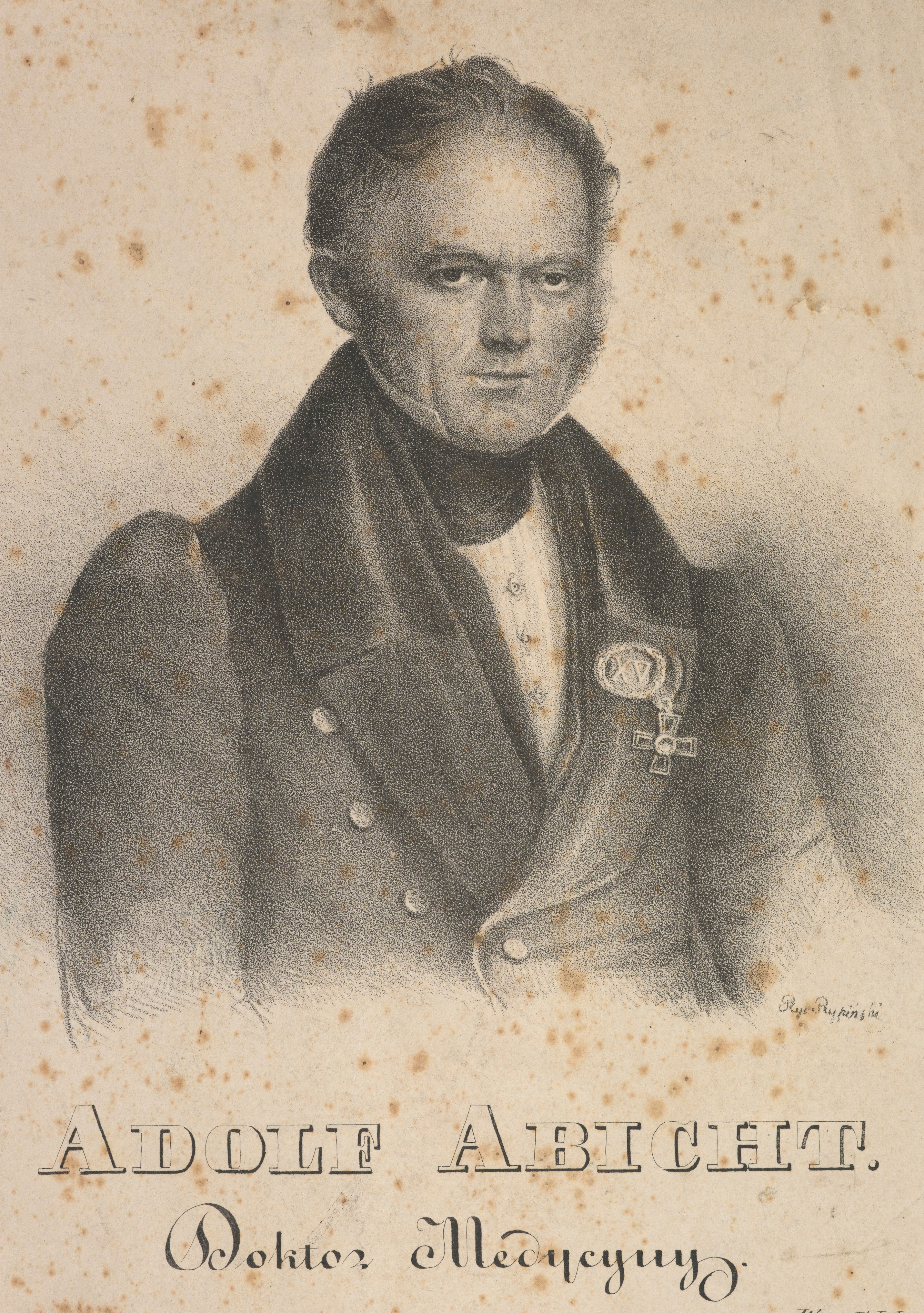 Adolf Abicht